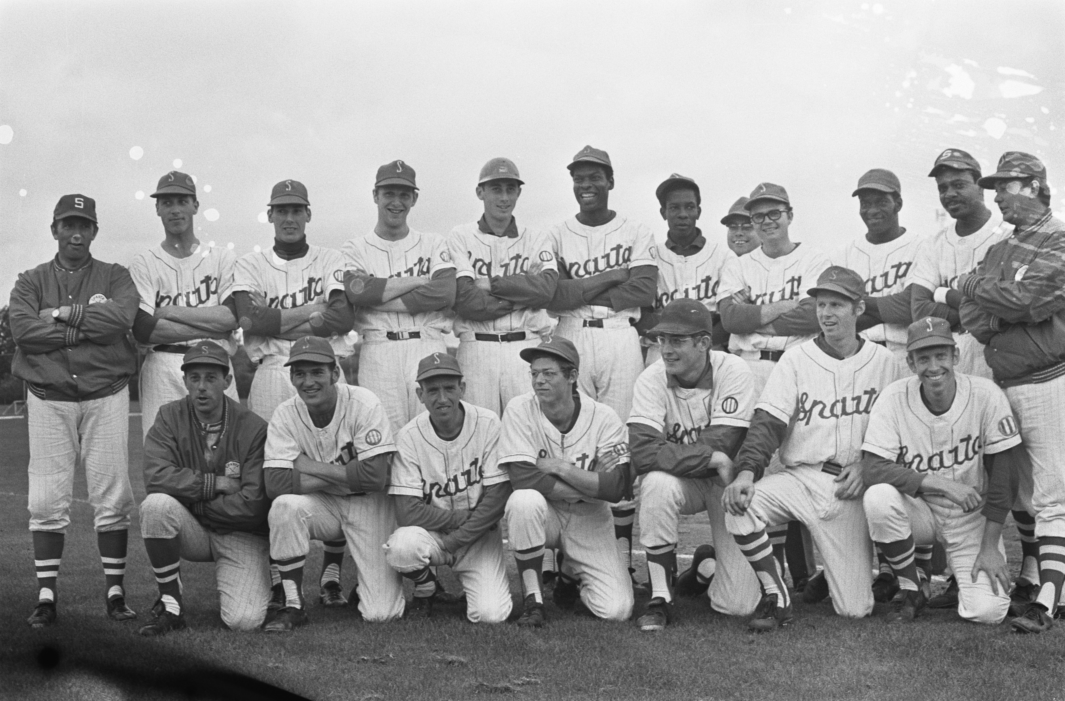 Collectie / Archief : Fotocollectie Anefo Reportage / Serie : [ onbekend ] Beschrijving : Honkbalteam van Sparta (Rotterdam) dat landskampioen werd na een overwinning op ABC (Amsterdam) Datum : 31 augustus 1969 Locatie : Rotterdam, Zuid-Holland Trefwoorden : honkbalteams Instellingsnaam : Sparta Fotograaf : Mieremet, Rob / Anefo Auteursrechthebbende : Nationaal Archief Materiaalsoort : Negatief (zwart/wit) Nummer archiefinventaris : bekijk toegang 2.24.01.05 Bestanddeelnummer : 922-7465